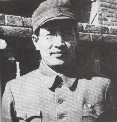 原东北野战军炮兵司令员朱瑞